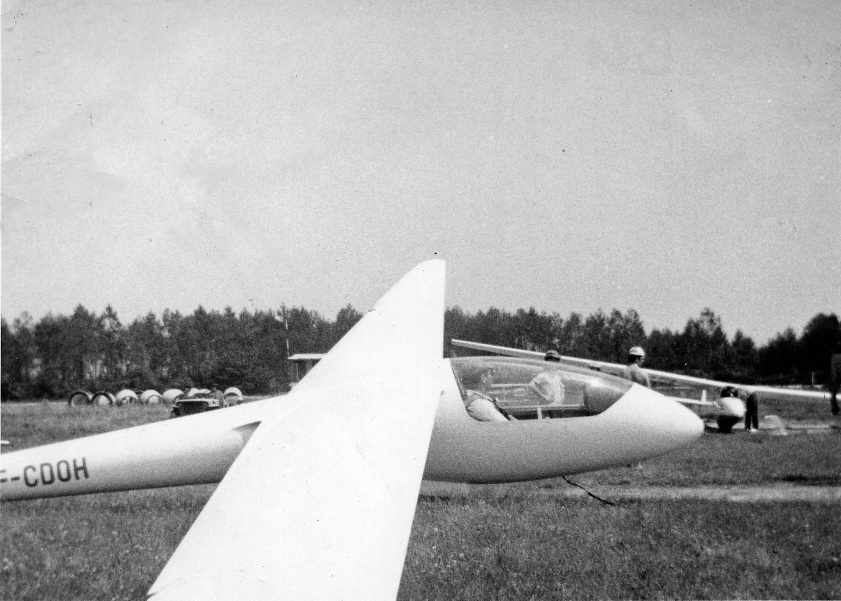 Bolkow Phoebus C vers 1971 sur le terrain de Bordeaux Saucats.